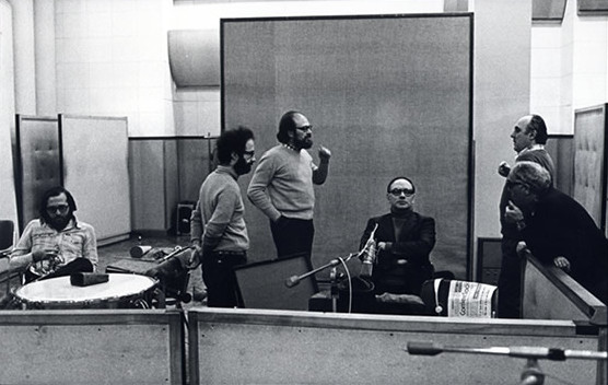 Gruppo di Improvvisazione Nuova Consonanza (nella foto di Roberto Masotti, scattata in una pausa della registrazione del disco della CRAMPS) siamo, nell’ordine: Giancarlo Schiaffini, Antonello Neri, io, Ennio Morricone, Egisto Macchi e Franco Evangelisti).